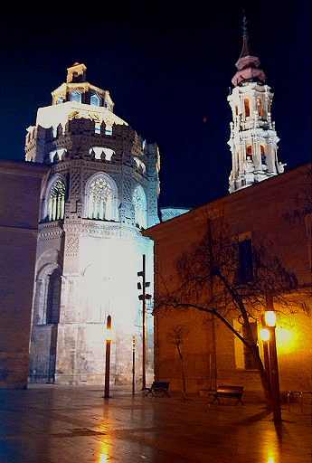 Imagen nocturna del ábside, cimborrio y torre de La Seo de Zaragoza